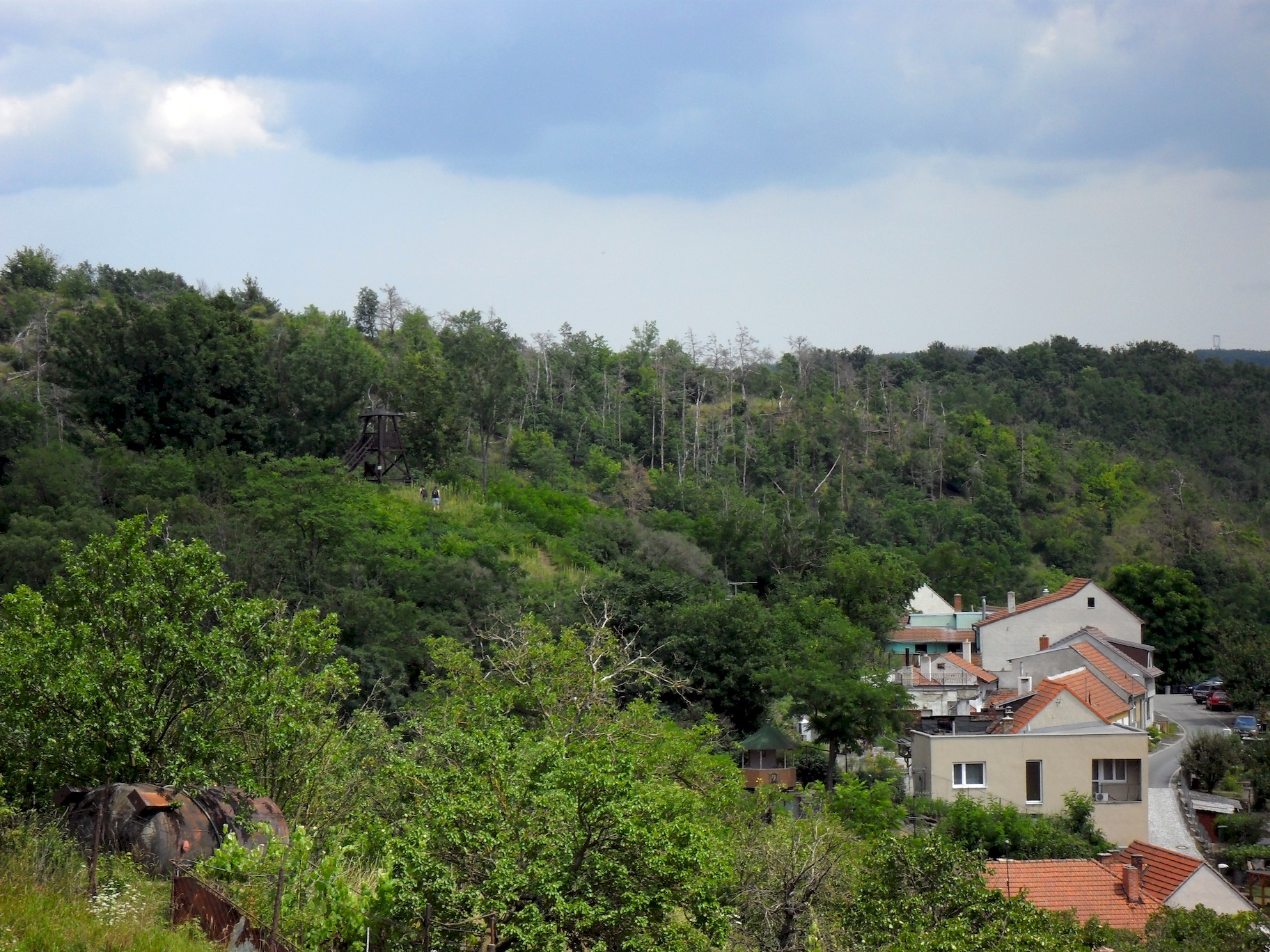 Náporky, Oslavany